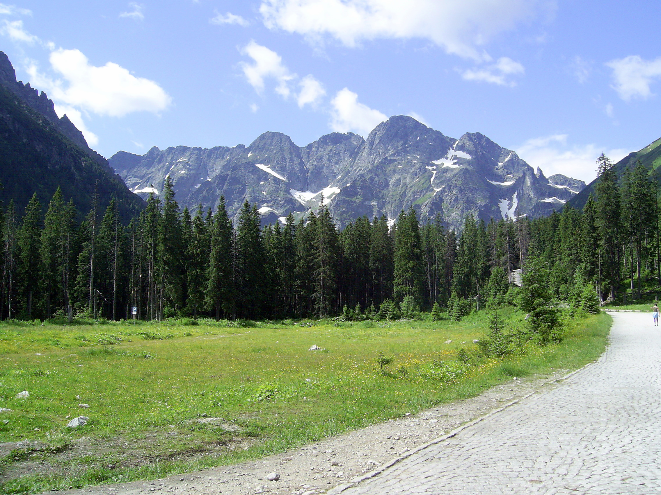 Wołowy Grzbiet, Mięguszowiecki Szczyt Czarny, Mięguszowiecki Szczyt Pośredni, Mięguszowiecki Szczyt Wielki, Cubryna i Zadni Mnich z polany Włosienica w Dolinie Rybiego Potoku